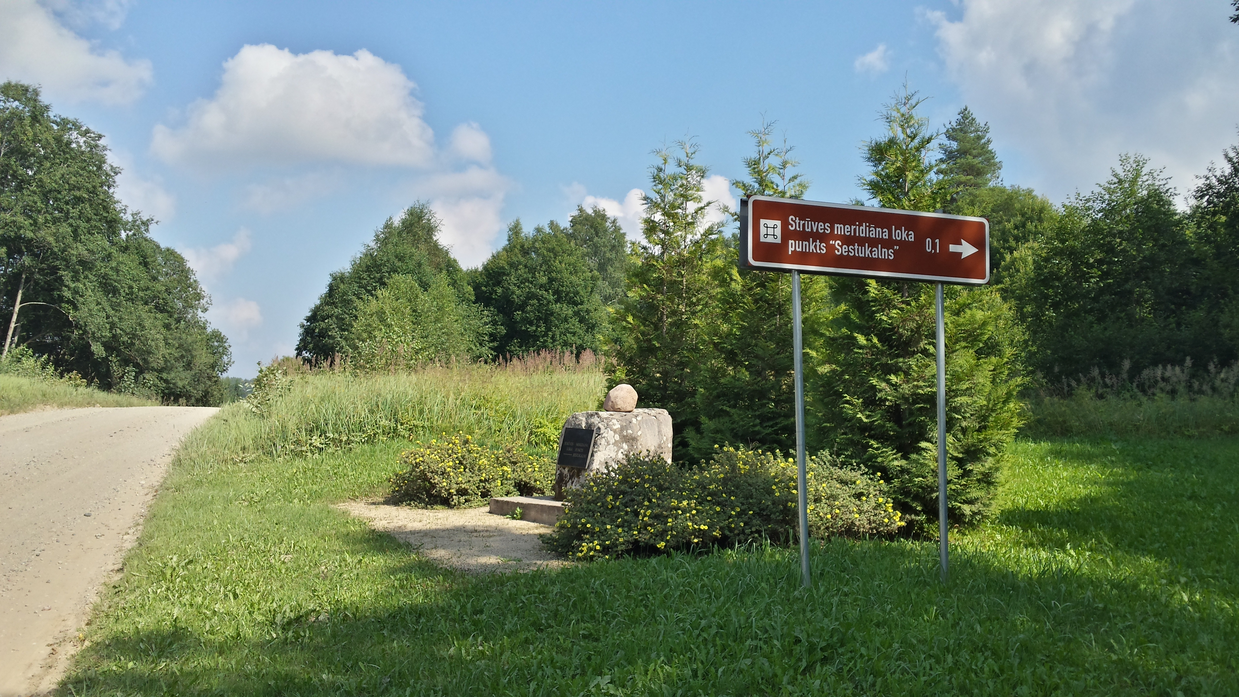 Strūves ģeodēziskā loka punkts Sestukalns